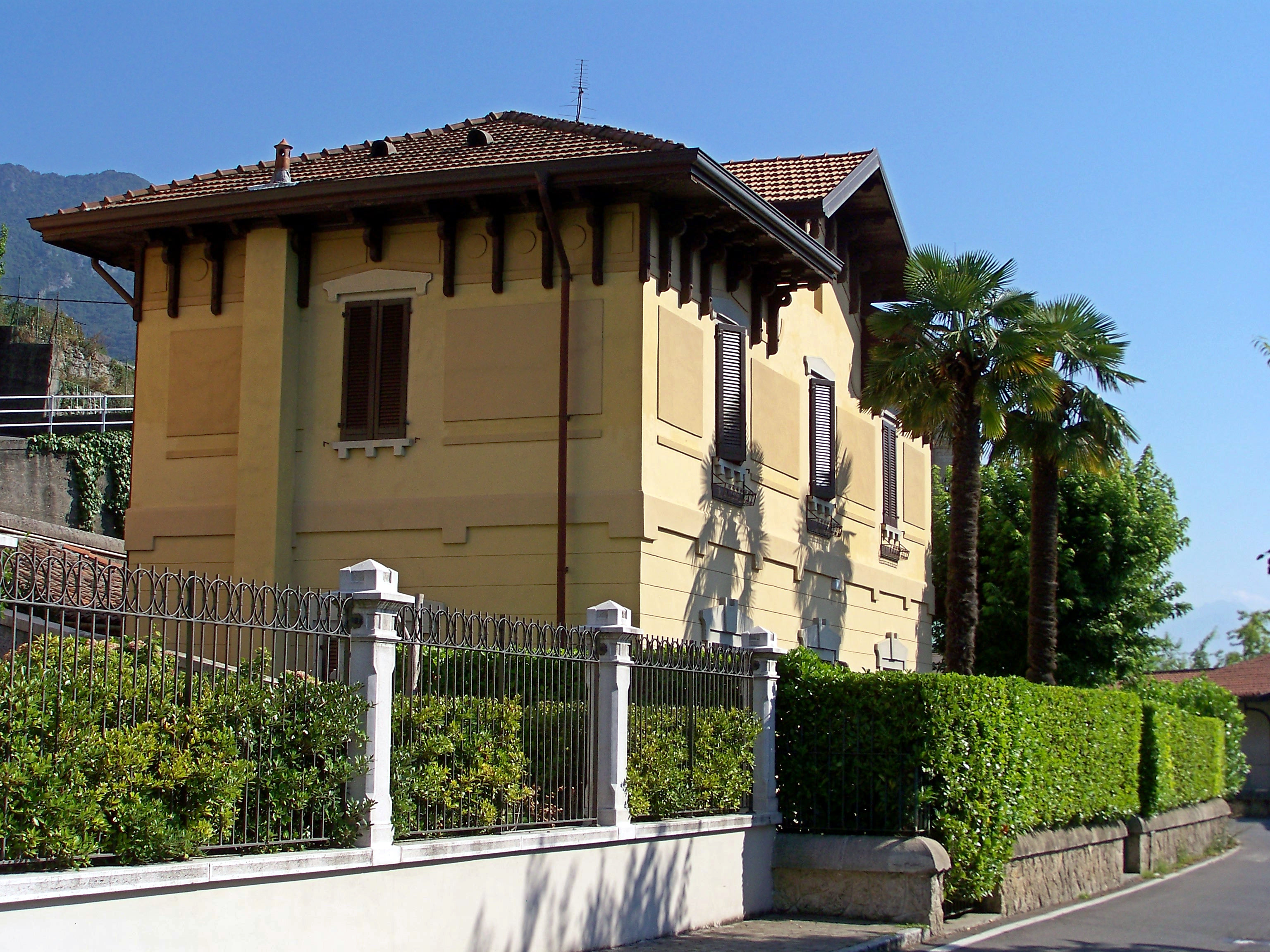 Il fabbricato viaggiatori della dismessa fermata tranviaria di Lovere Alto della Trescore-Lovere